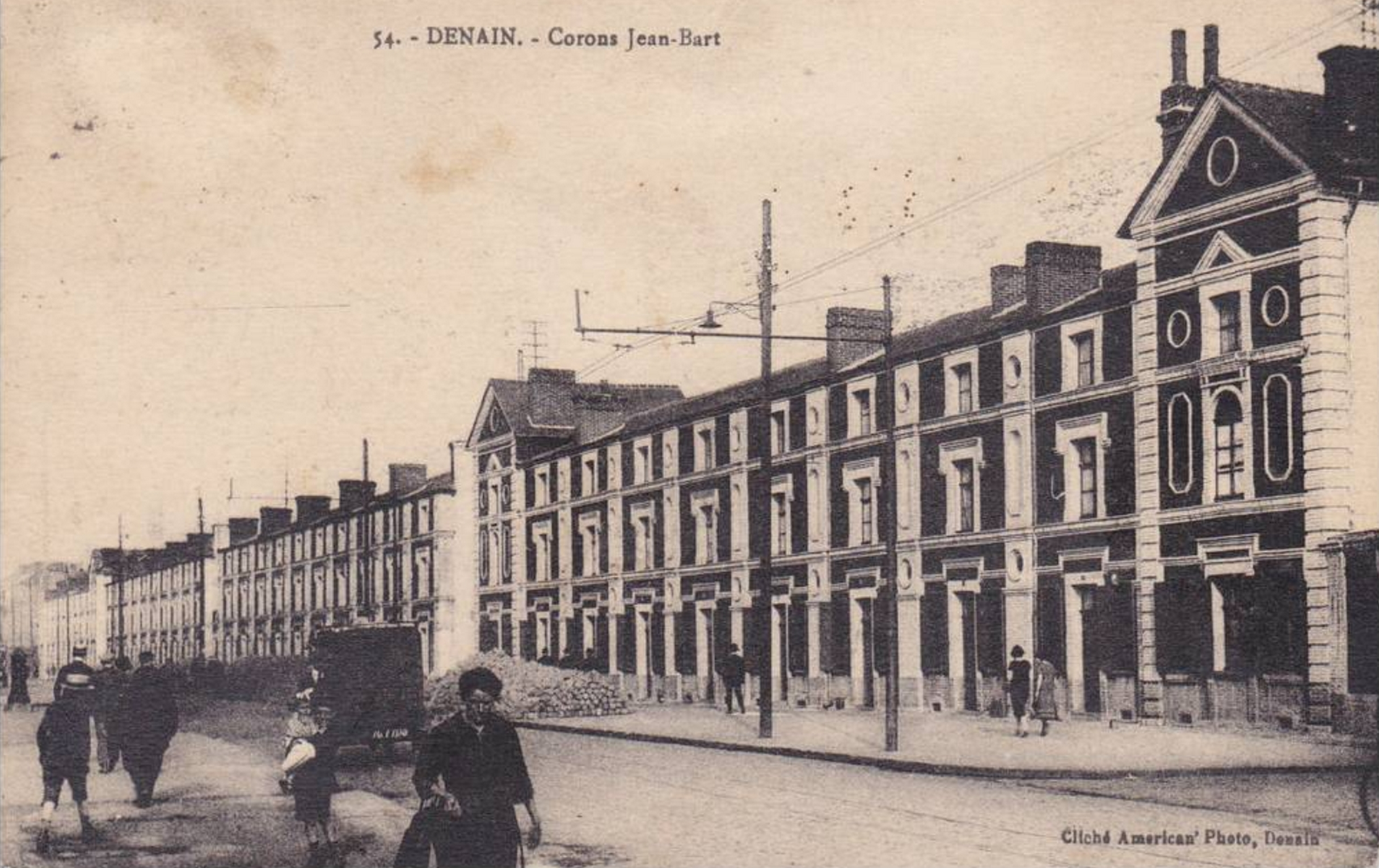 Cités de la fosse Jean Bart de la Compagnie des mines d'Anzin, Denain, Nord, Nord-Pas-de-Calais, France.